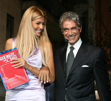 Cristina Chiabotto & Gianfranco Jannuzzo